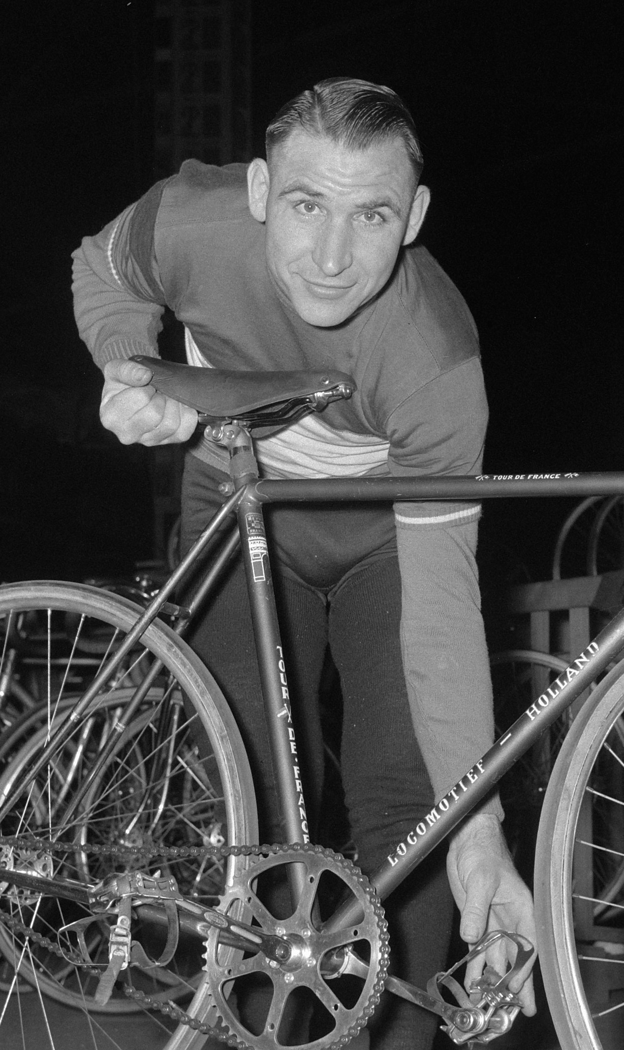 Wielerzesdaagse in het sportpaleis te Antwerpen. Wim van Est